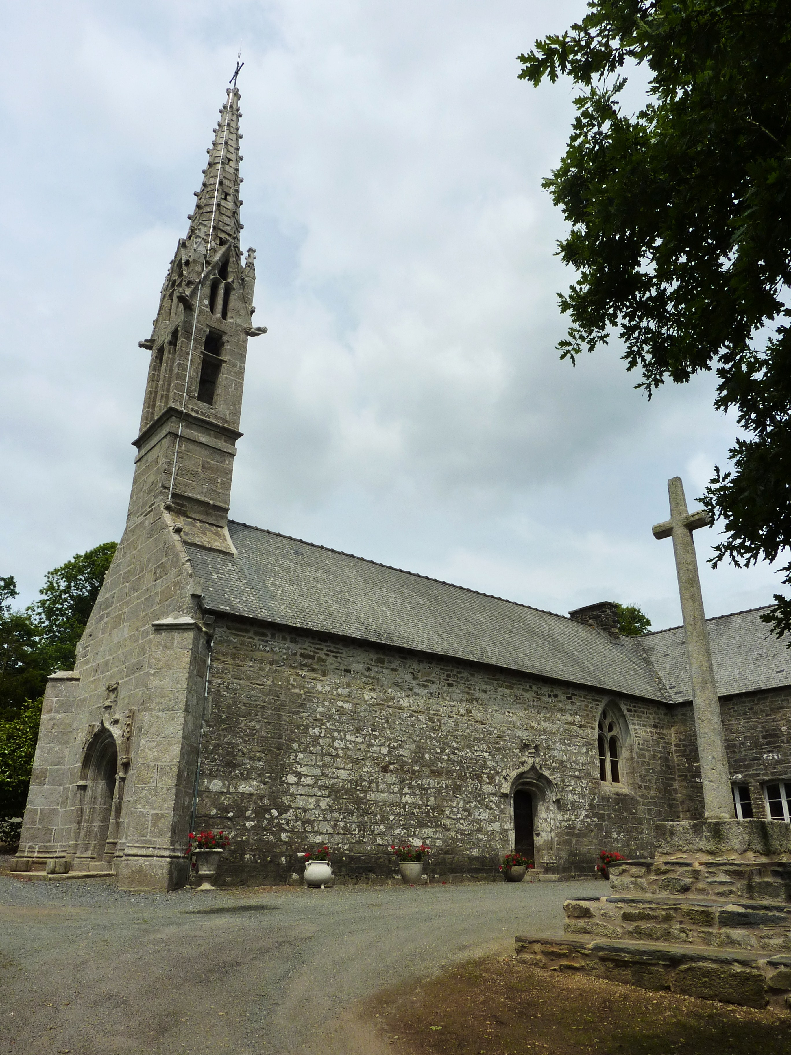 Lannédern: la chapelle de Coat ar Roc'h (emplacement de l'ermitage de saint Edern)